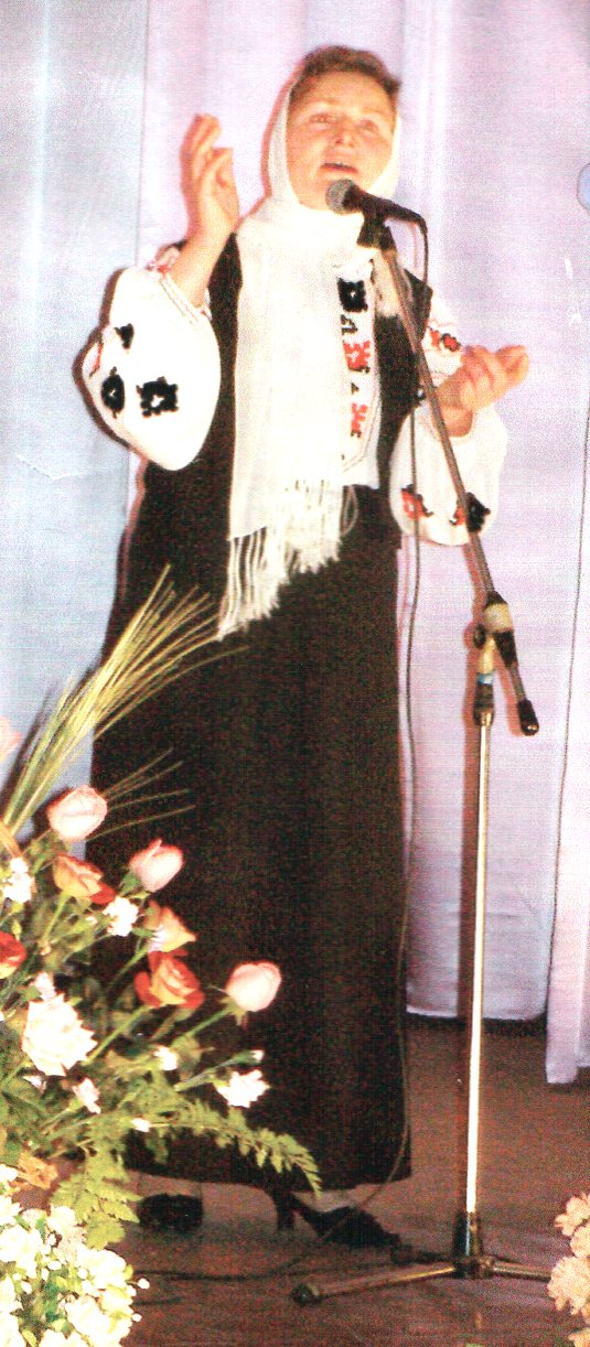 Калініченко Катерина Іванівна